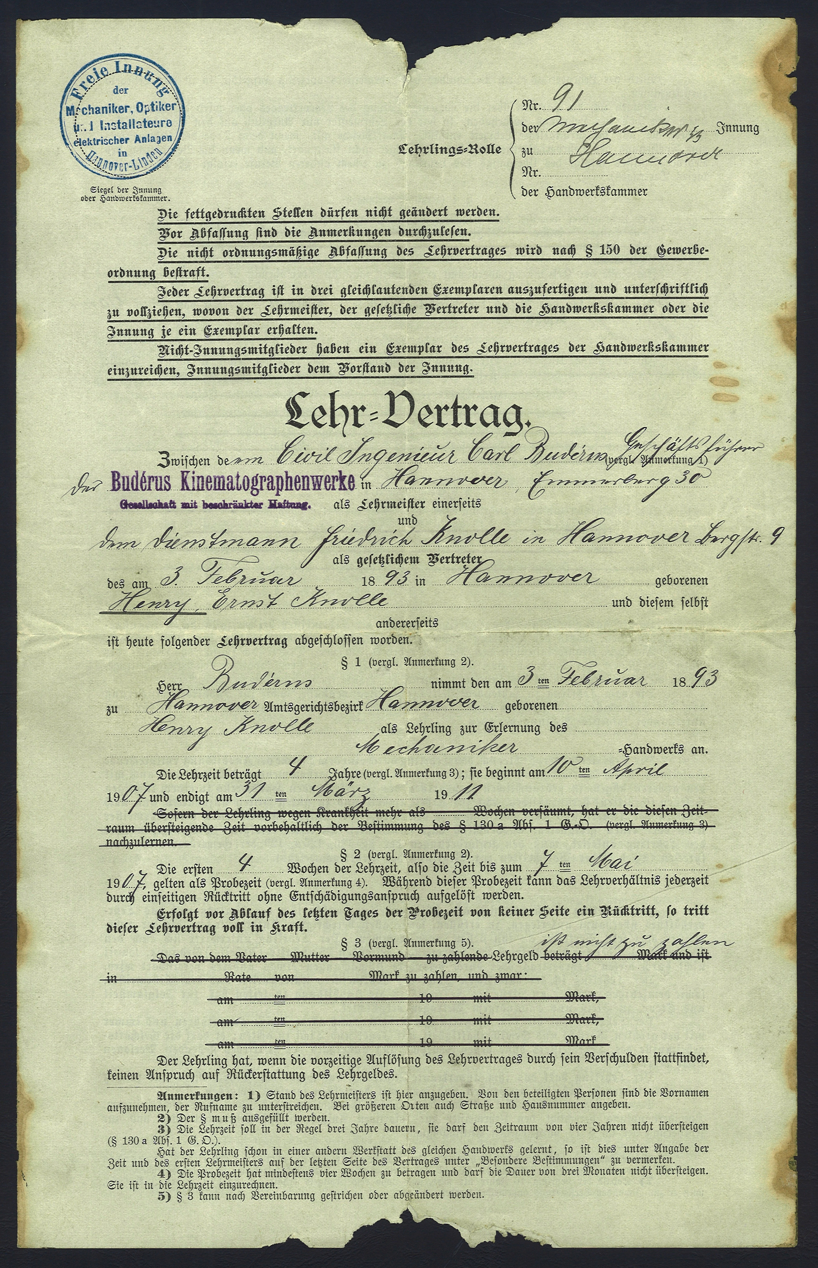 Vordruck Lehr-Vertrag, Druck und Verlag von Heinrich Ahlfeld in Hannover, eigenhändig ausgefüllt von dem "Civil Ingenieur" Carl Buderus, Geschäftsführer der Budérus Kinematographenwerke Gesellschaft mit beschränkter Haftung, Hannover, Emmerberg 30, als Lehrmeister einerseits und dem Dienstmann Friedrich Knolle in Hannover, Bergstr. 9 als gesetzlichem Vertreter des am 3. Februar 1893 in Hannover geborenen Henry Ernst Knolle und diesem selbst andererseits ... Seite 1 ...